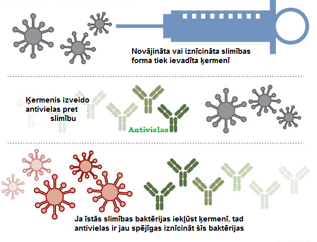 Vakcinacijas metodika